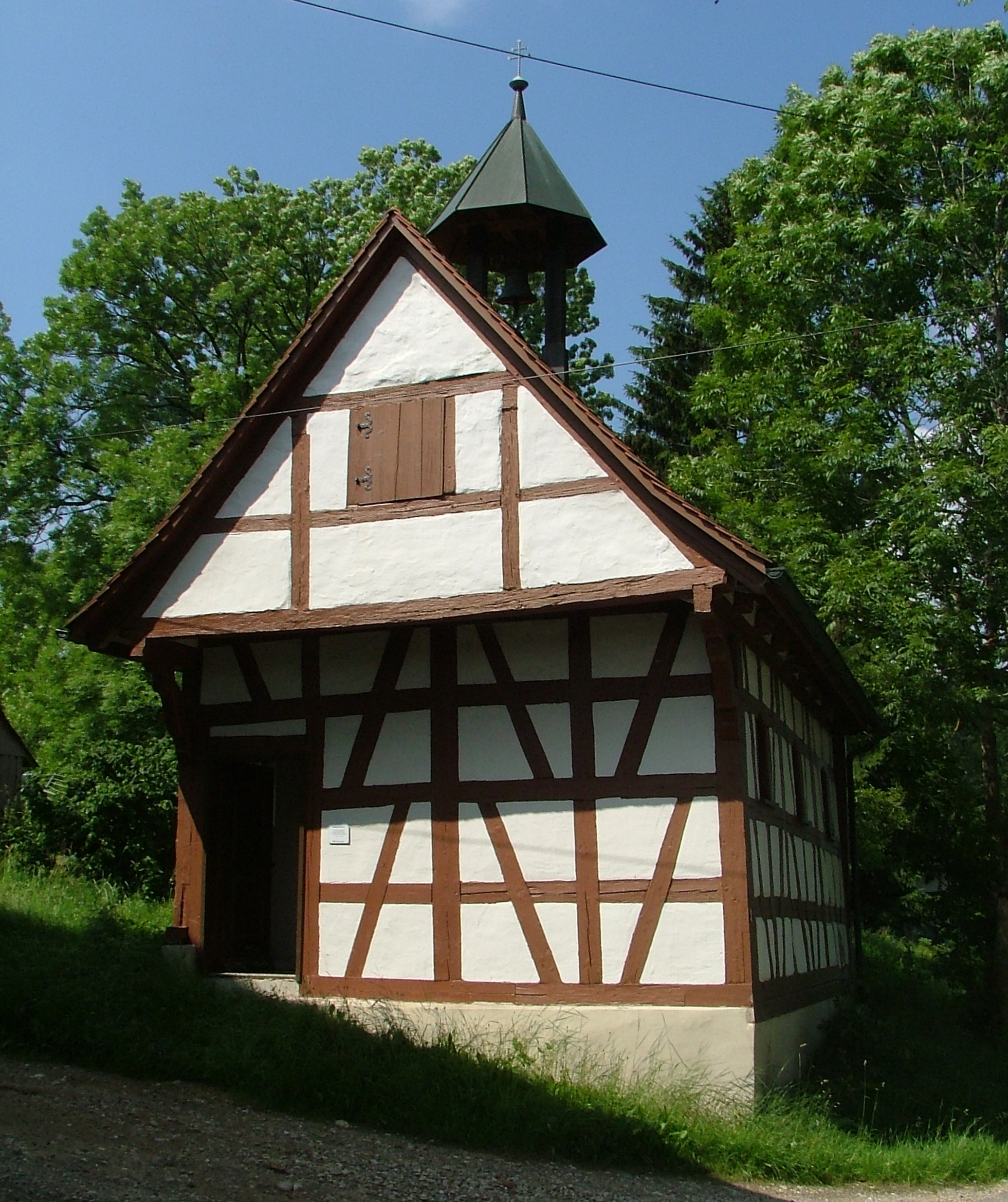 Ellmeney Fachwerkkapelle